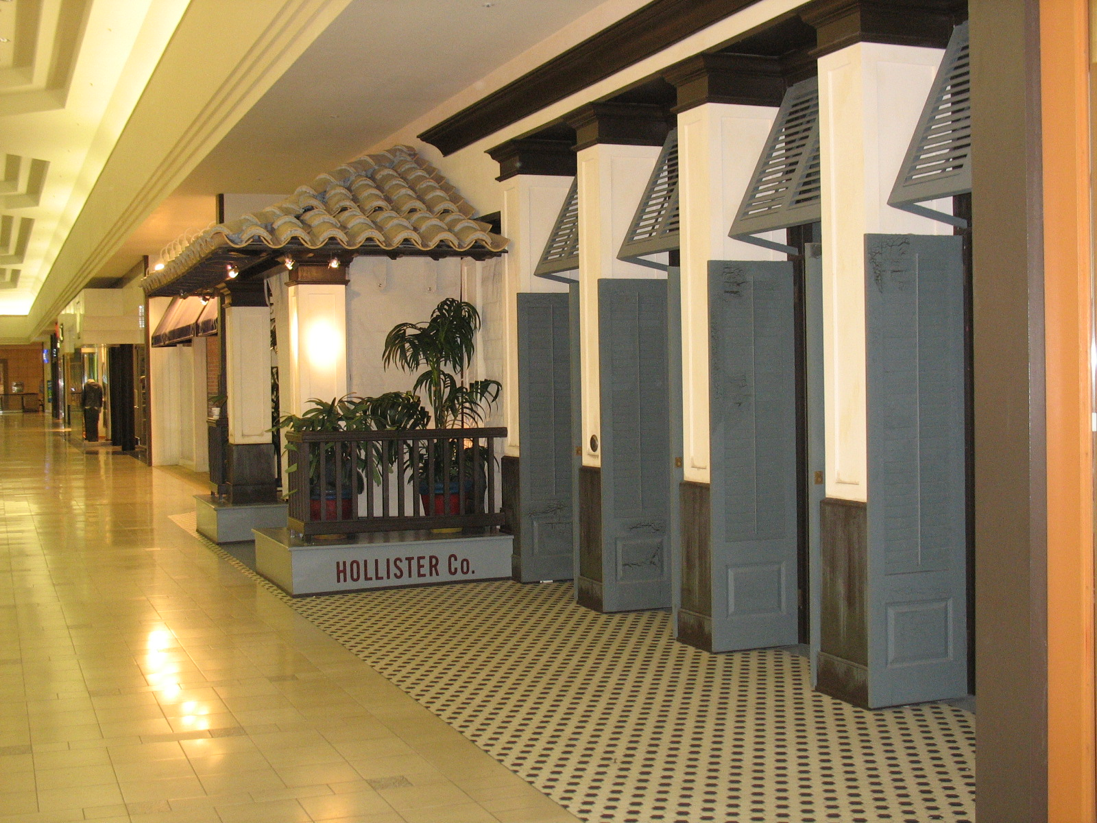 Tienda Hollister